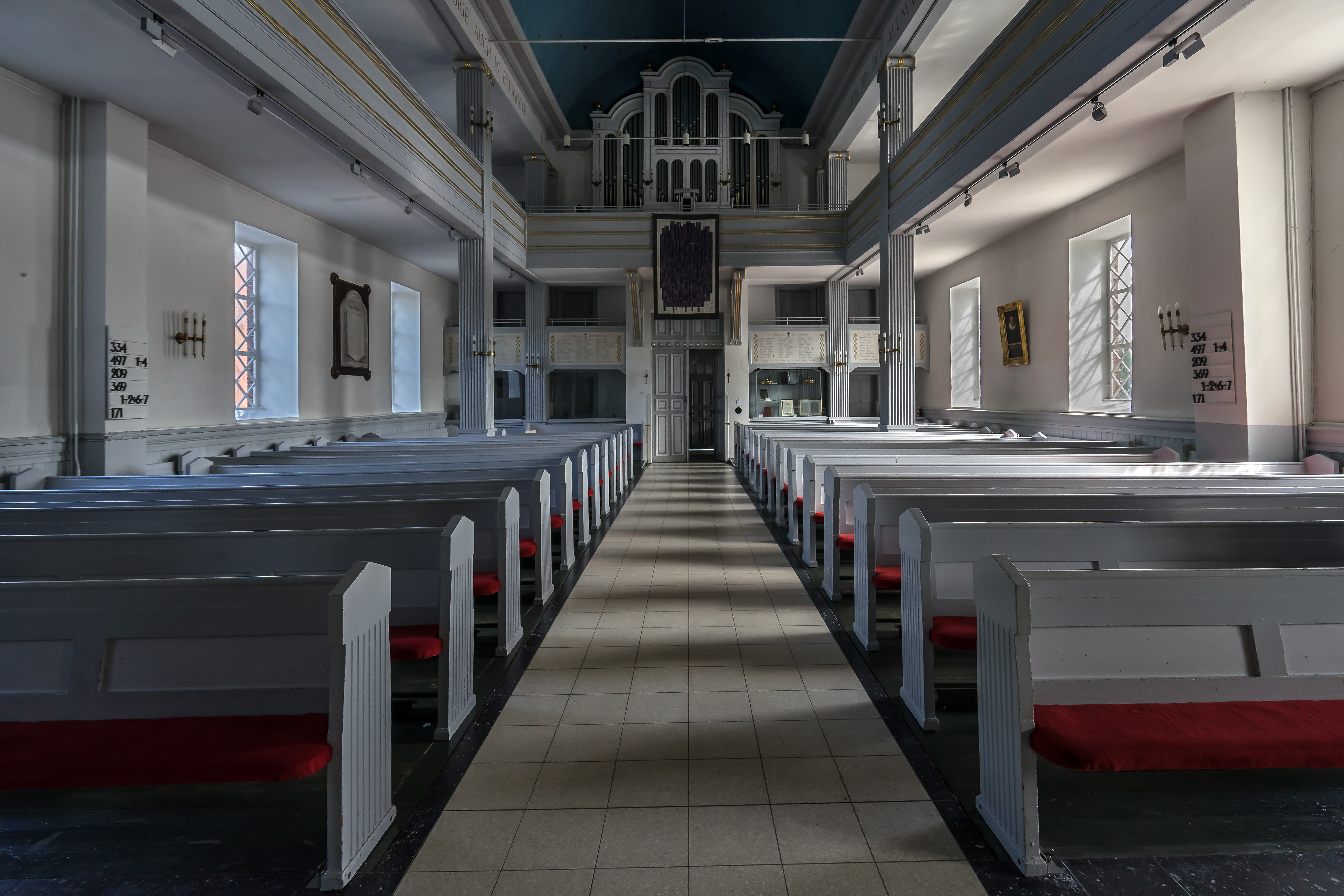 Martinskirche (Blick vom Altar auf die Orgel), Cuxhaven-Ritzebüttel